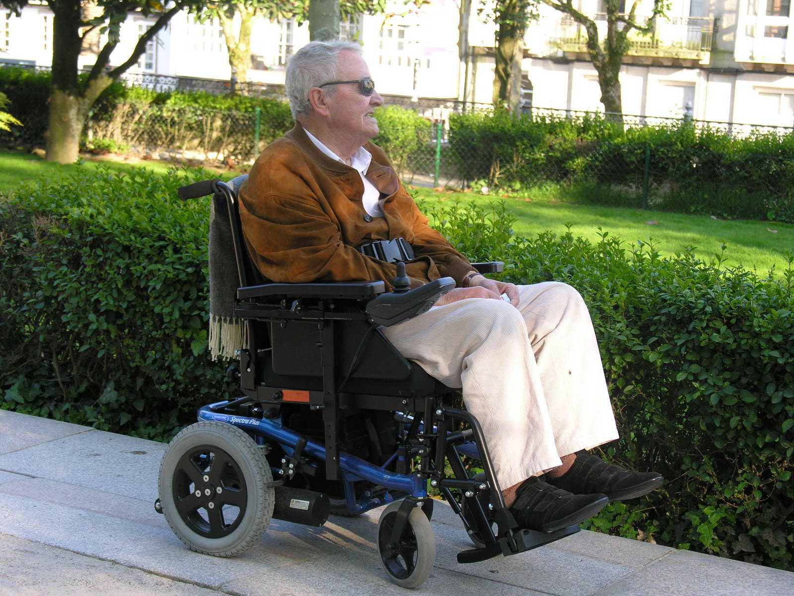 Home en cadeira de rodas na Alameda de Santiago Publish by= Luis Miguel Bugallo Sánchez. Self made